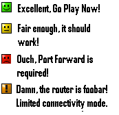 Estado del Puerto